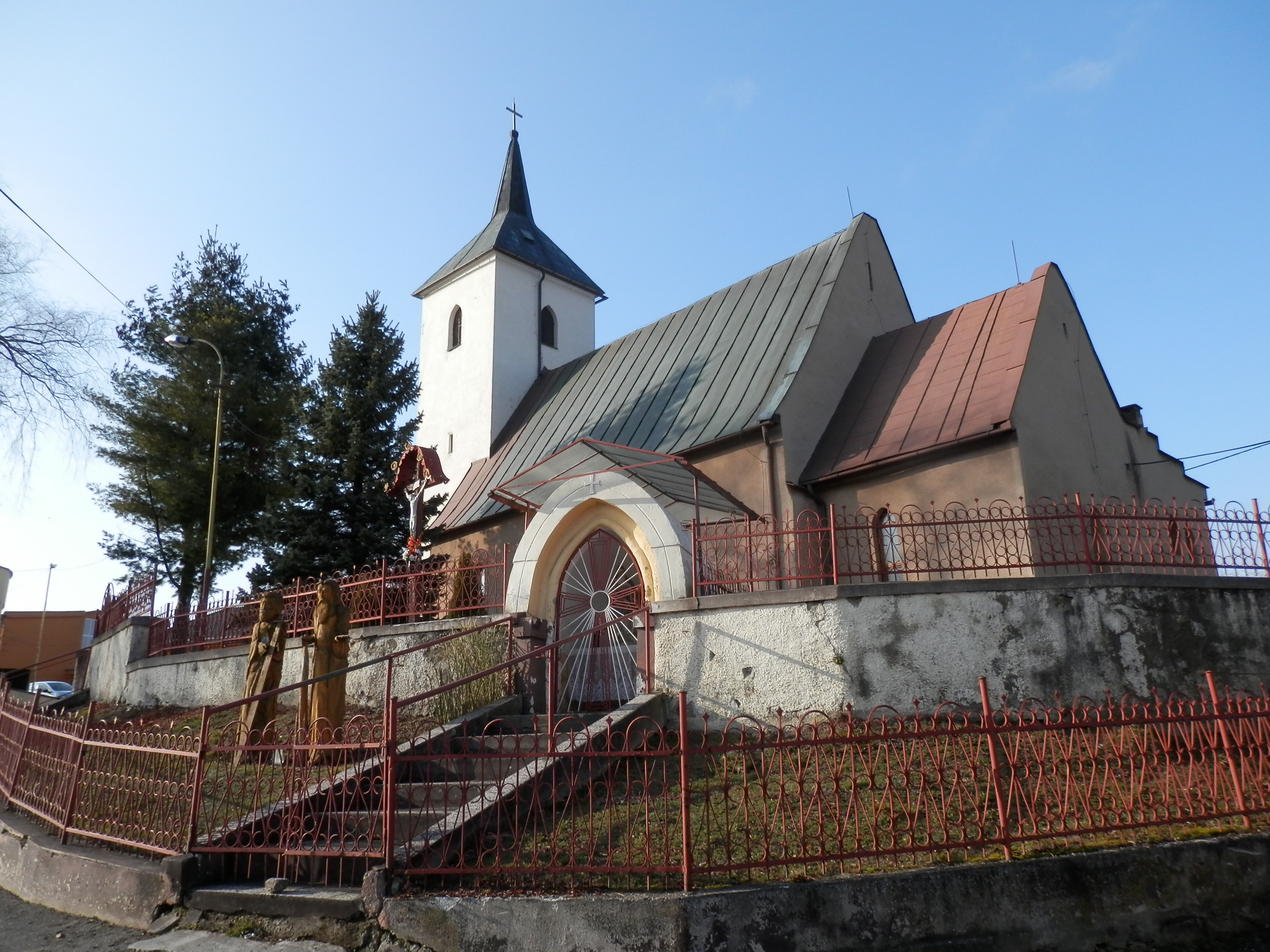 Kostol svätého Šimona a Judu. Obec Hrabkov, okres Prešov, región Šariš